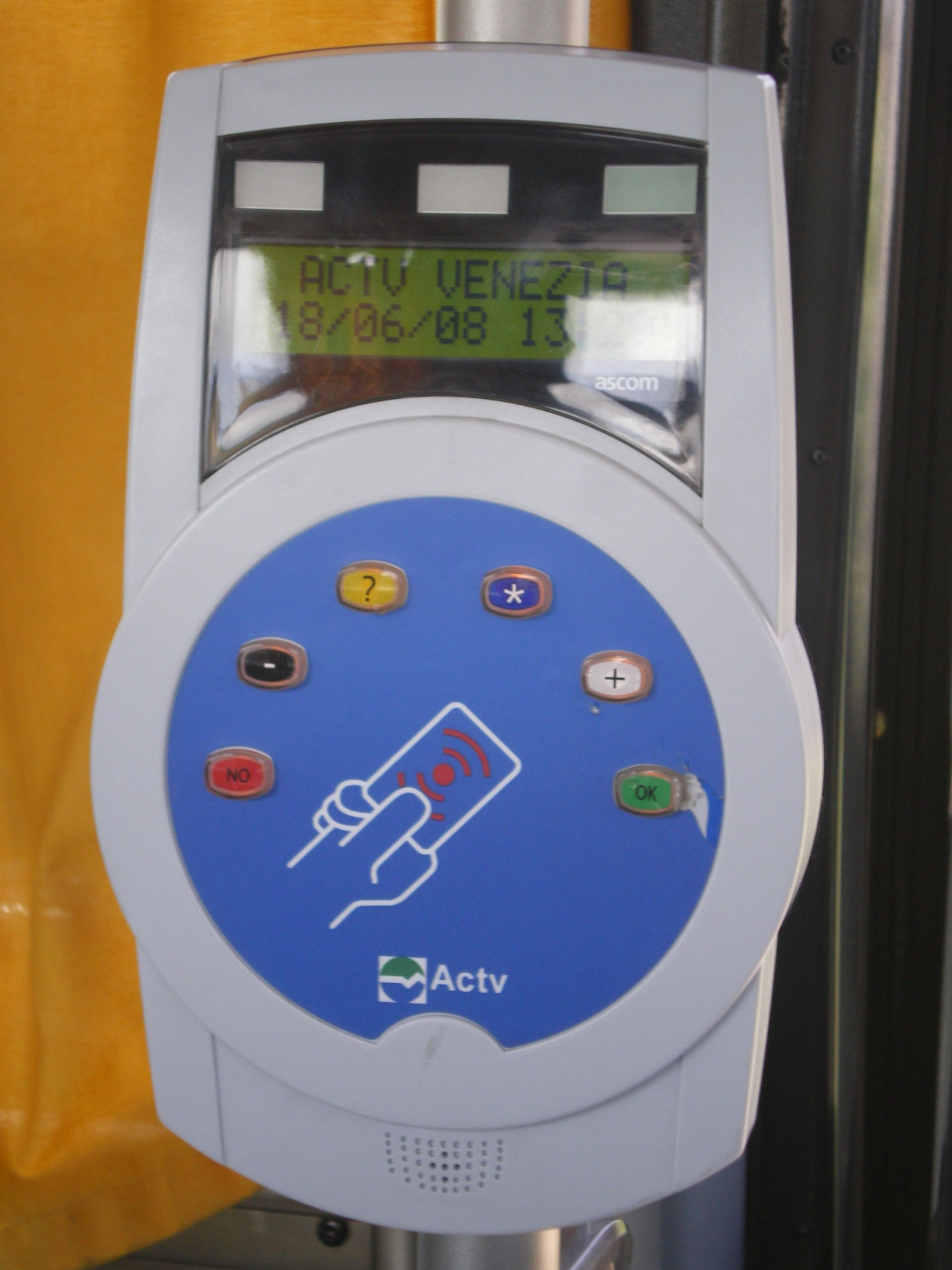 VALIDATRICE IMOB